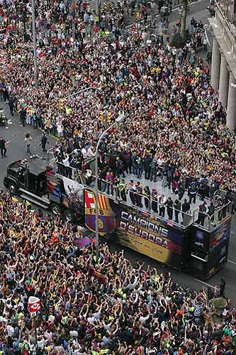 Pese a que la lluvia amenazó con aguar la fiesta, el 'ruódromo', como se bautizó la caravana en esta ocasión, ha recorrido con lentitud las calles de Barcelona ante una afición bulliciosa que se echó masivamente a la calle. Cruïlla de la Gran Via amb el Passeig de Gràcia. Les columnes que es veuen a la dreta són de l'edifici Banco Vitalicio (ara Generali).